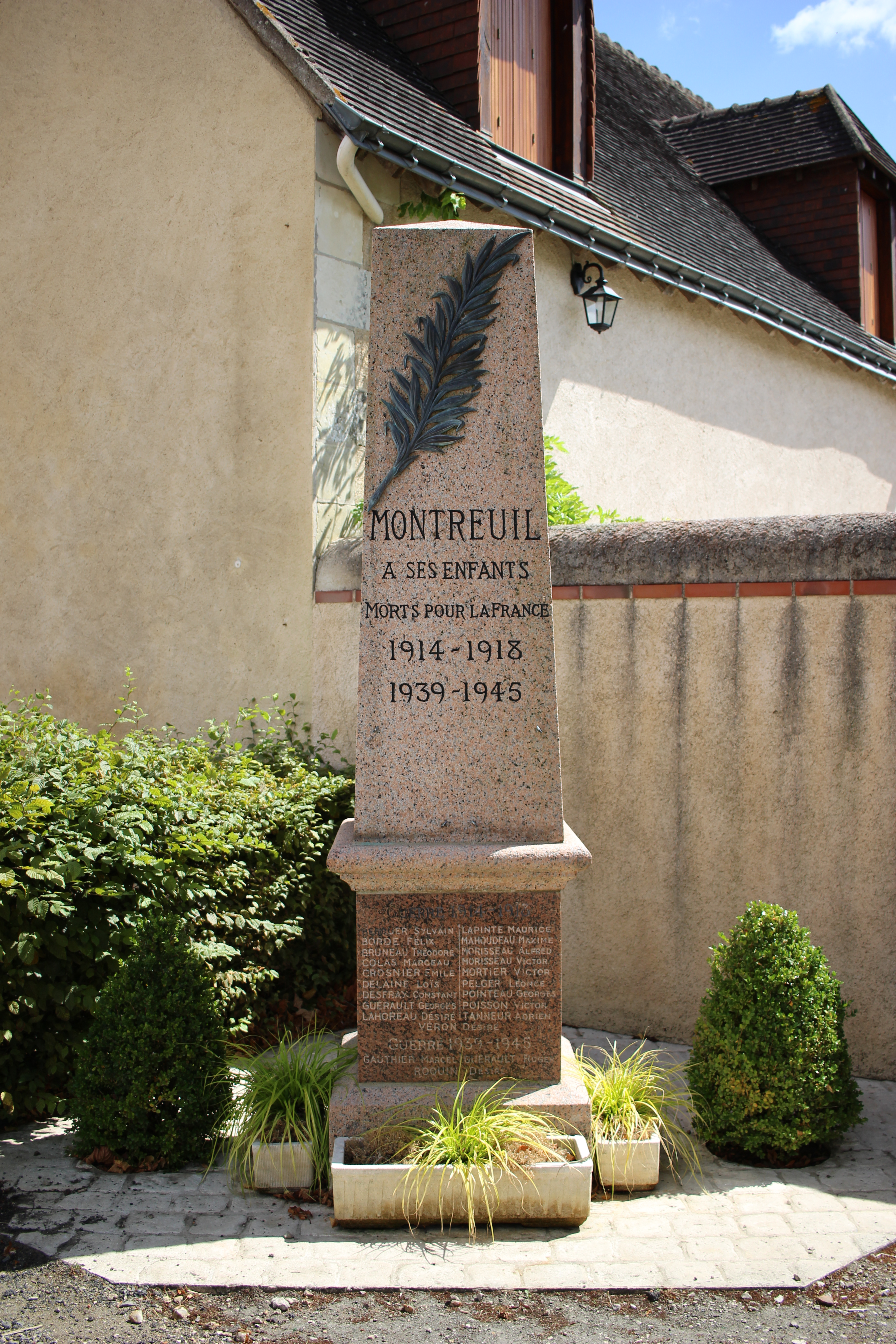 Monument aux morts de Montreuil-en-Touraine (France).